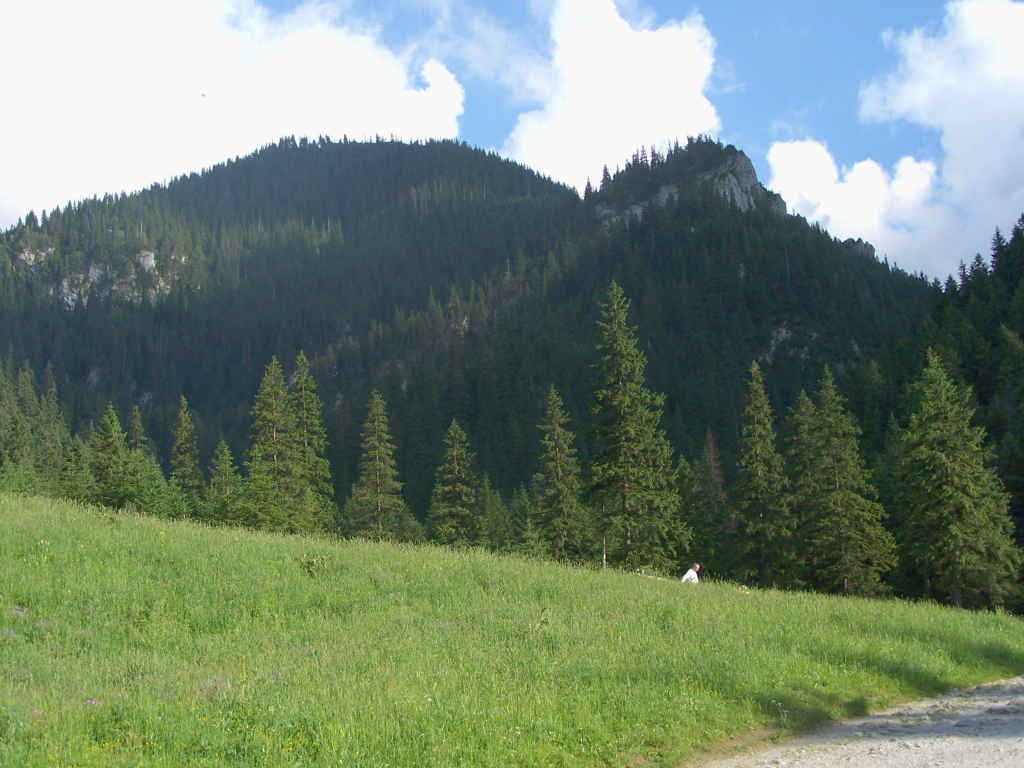 Zbójnicka Turnia (Tatra Mountains, Dolina Kościeliska)